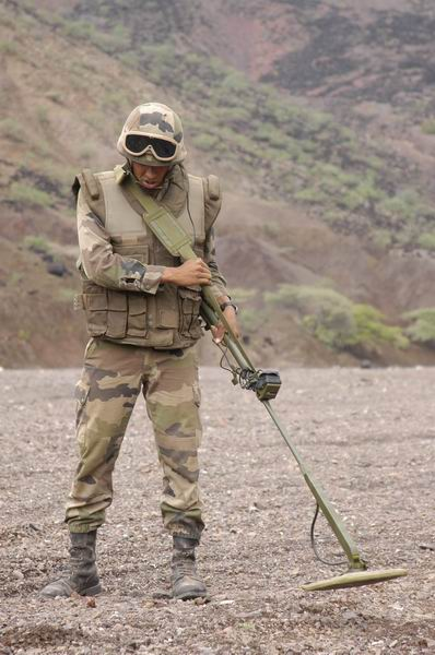 Démineur de la compagnie de génie de la 13eDemi-brigade de Légion étrangère à Djibouti en 2005